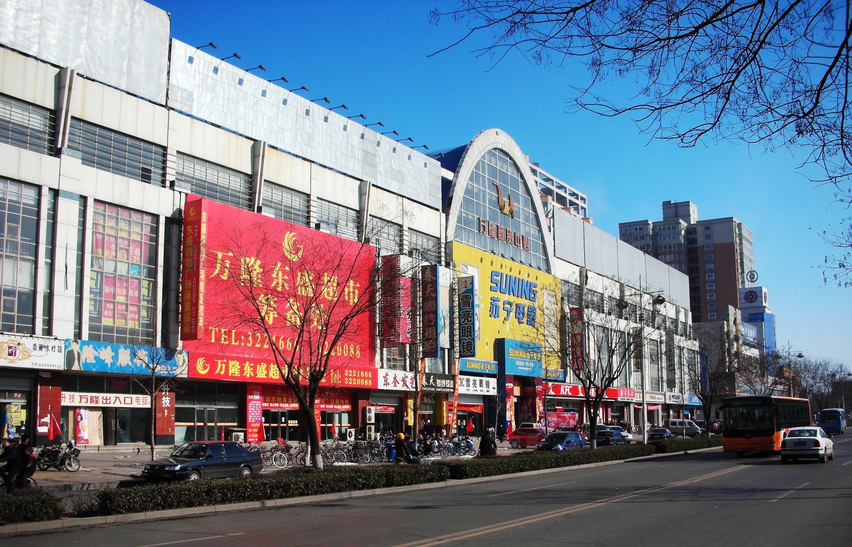 Fengrun 丰润